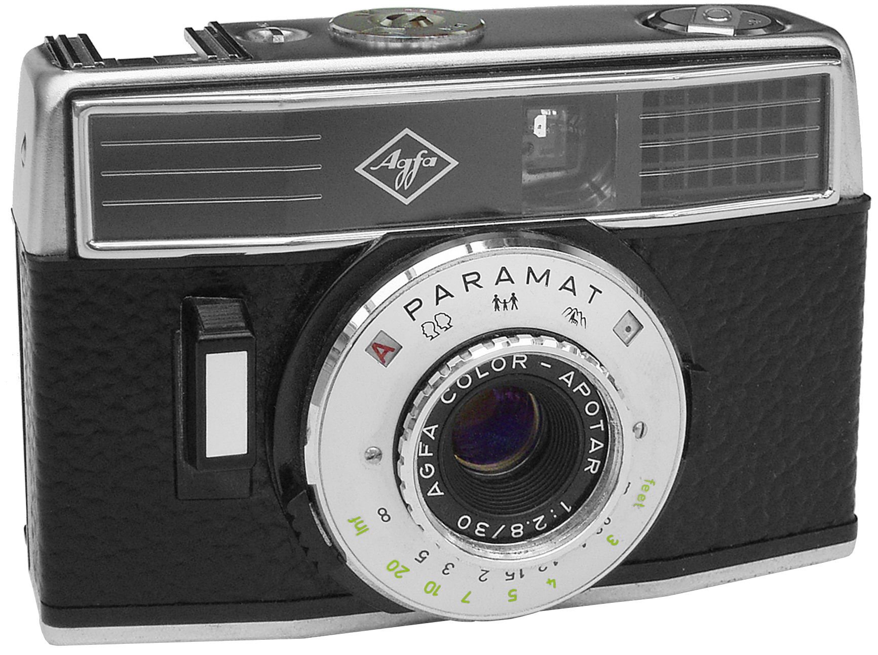 Bei Agfa war man 1963 offensichtlich der Meinung, dass die Filme nun feinkörnig genug seien, um auch aus dem halben Kleinbildformat (18x24 cm) anständige Vergrößerungen anfertigen zu können. Immerhin bekommt man so aus einem 36er-Film 72 Aufnahmen. Drei Kameras wurden für dieses Format angeboten: die Parat I, diese Paramat und die anspruchsvollere Optima Parat. Die Paramat ist ein kompaktes Gerät mit recht einfacher Bedienung, aber immerhin mit ordentlichem Objektiv (Dreilinser), automatischer Blendensteuerung und Fokussiermöglichkeit von 90 cm bis ∞. Bei der Belichtungszeit beschränkt man sich auf die "verwacklungssichere" 1/125 Sekunde, die Blende wird von den Werten des Selen-Belichtungsmessers gesteuert. Unzureichende Lichtverhältnisse werden im Sucher durch ein rotes Signal angezeigt, bei Grün darf man abdrücken. Benutzt man ein Blitzgerät, stellt sich die Zeit auf 1/30 Sek., die Blende wird manuell eingegeben. Auch Langzeitaufnahmen sind über "B" möglich. Gewöhnungsbedürftig ist die Kamerahaltung: Hält man sie "normal" quer, hat man ein hochformatiges Negativ, für das Querformat muss man den Apparat hochkant halten. Die Paramat kostete 149,- DM.